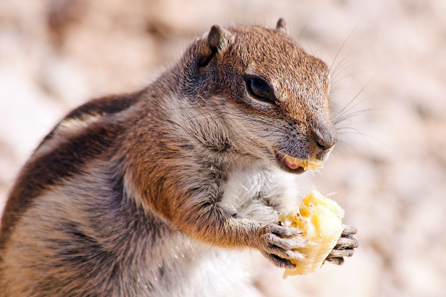 Fuerteventura, Kanarische Inseln, Spanien, Datum/Uhrzeit: 21.02.2012 16:50:11